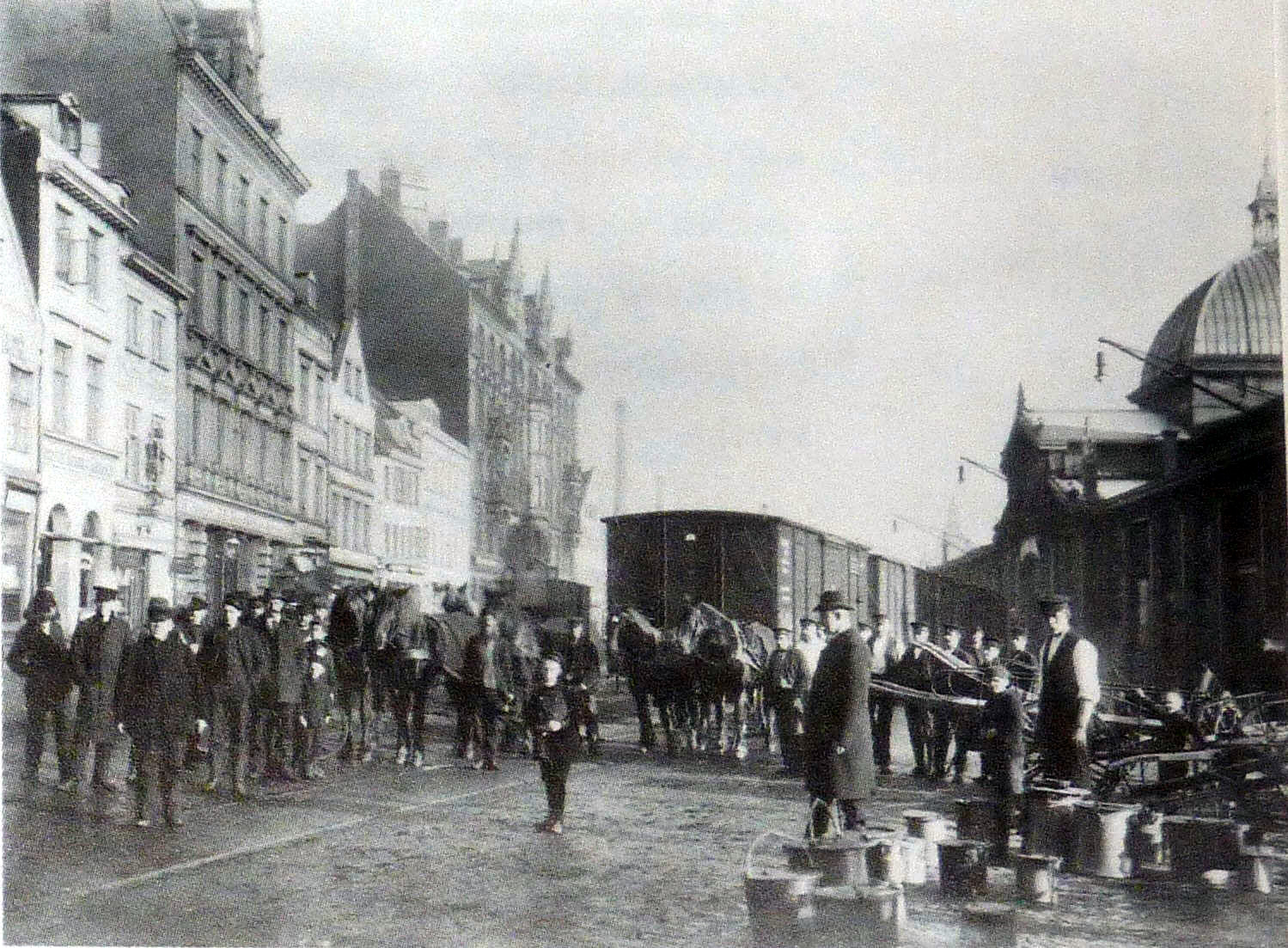 Anschlussbahn in der Großen Elbstraße vor der Altonaer Fischauktionshalle